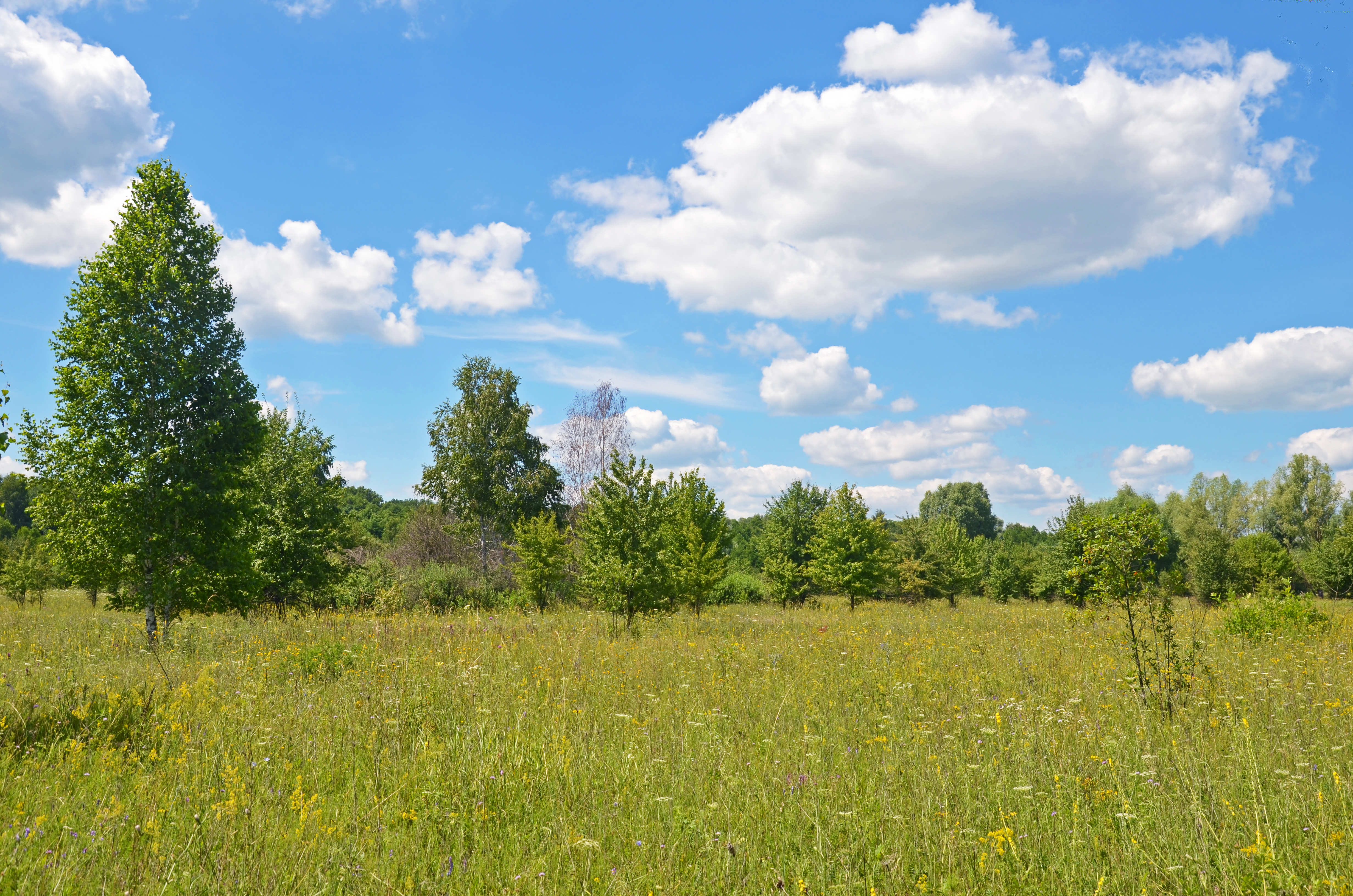 Луки, Ніжинський район, кв. 56-60 Ніжинського лісництва